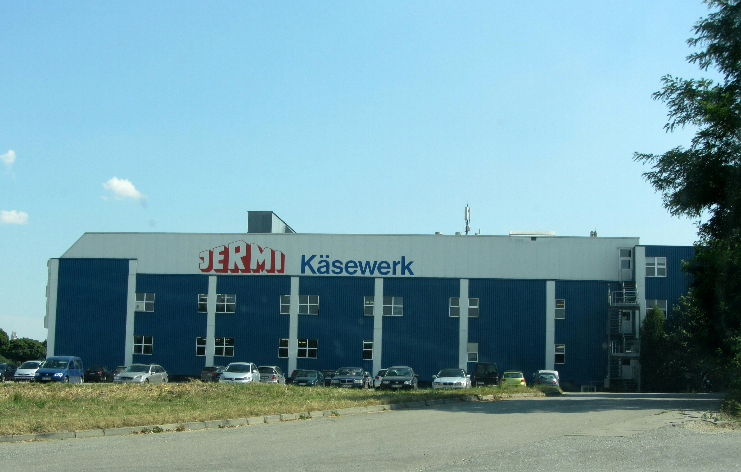 Käserei